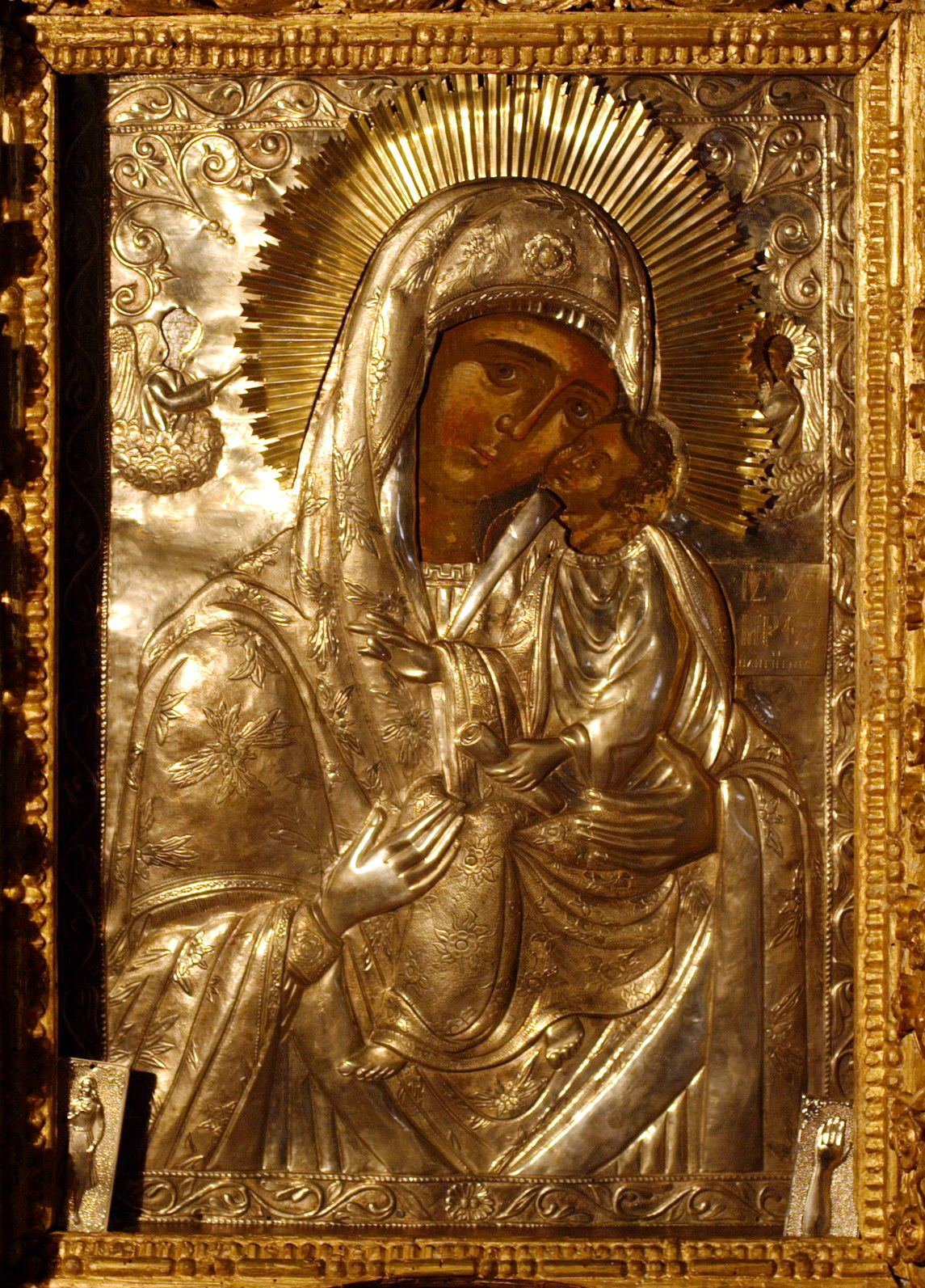 Чудотворная икона Богородицы, находится в монастыре Петра, Греция.